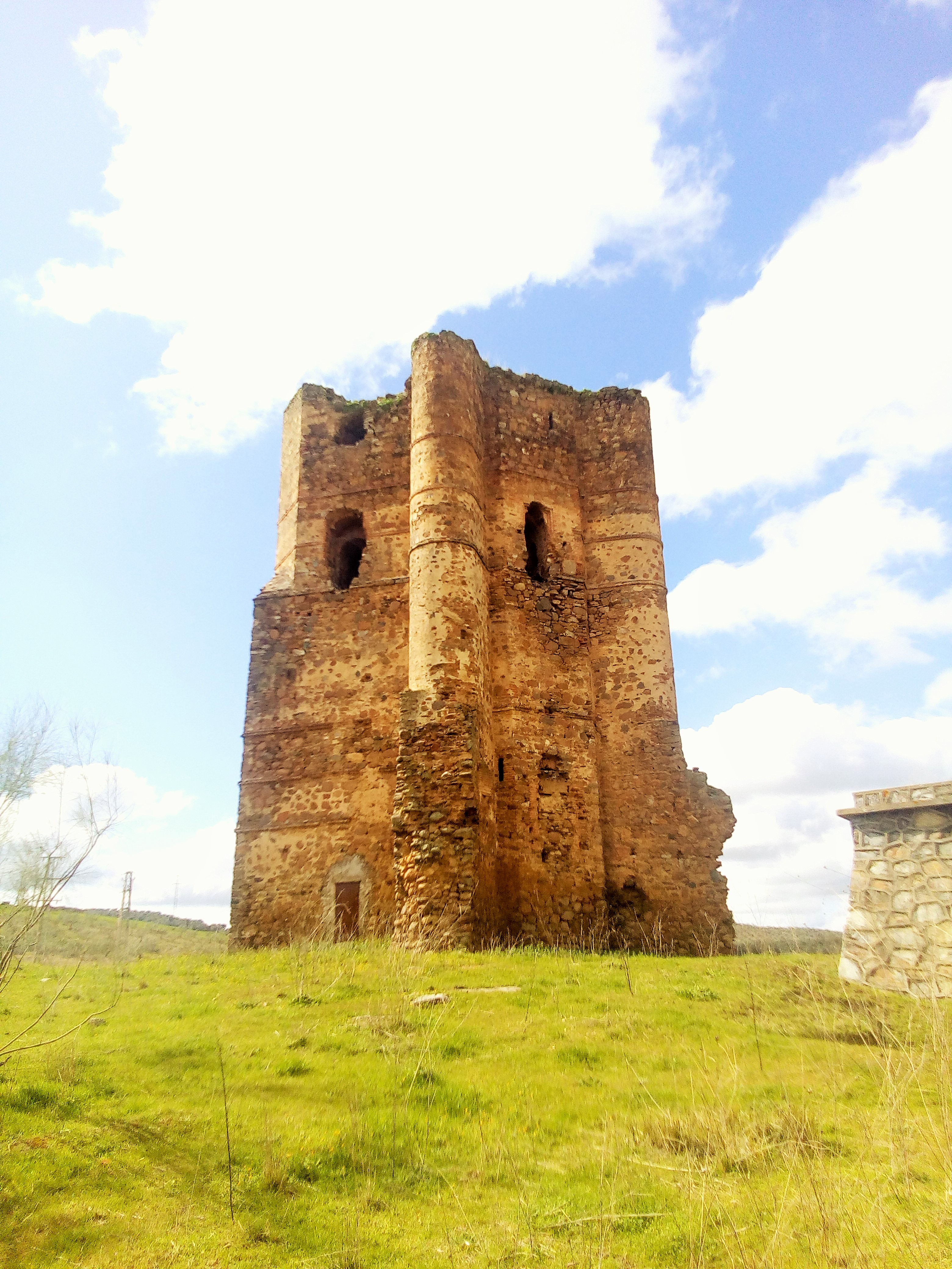 Torreón Defensivo del siglo XV construido por Alonso de Cardenas conocido como El Castillo